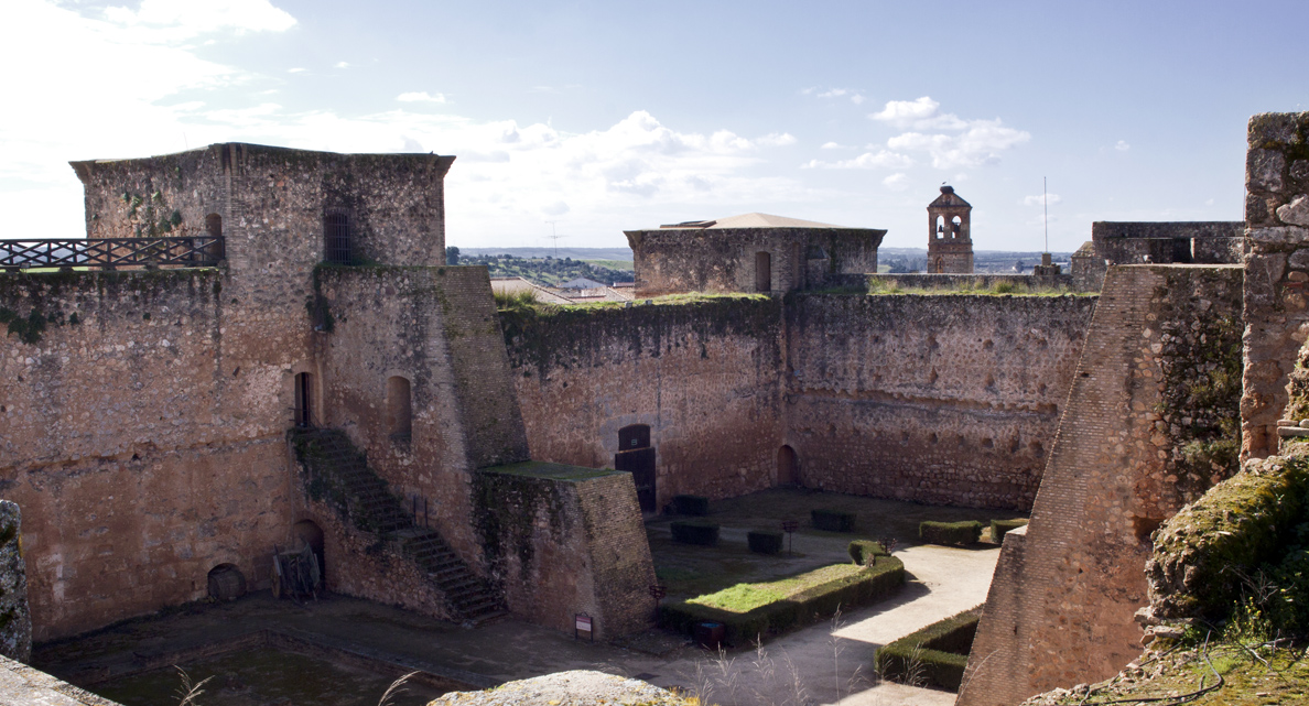 Castillo de los Guzmanes. Niebla. España